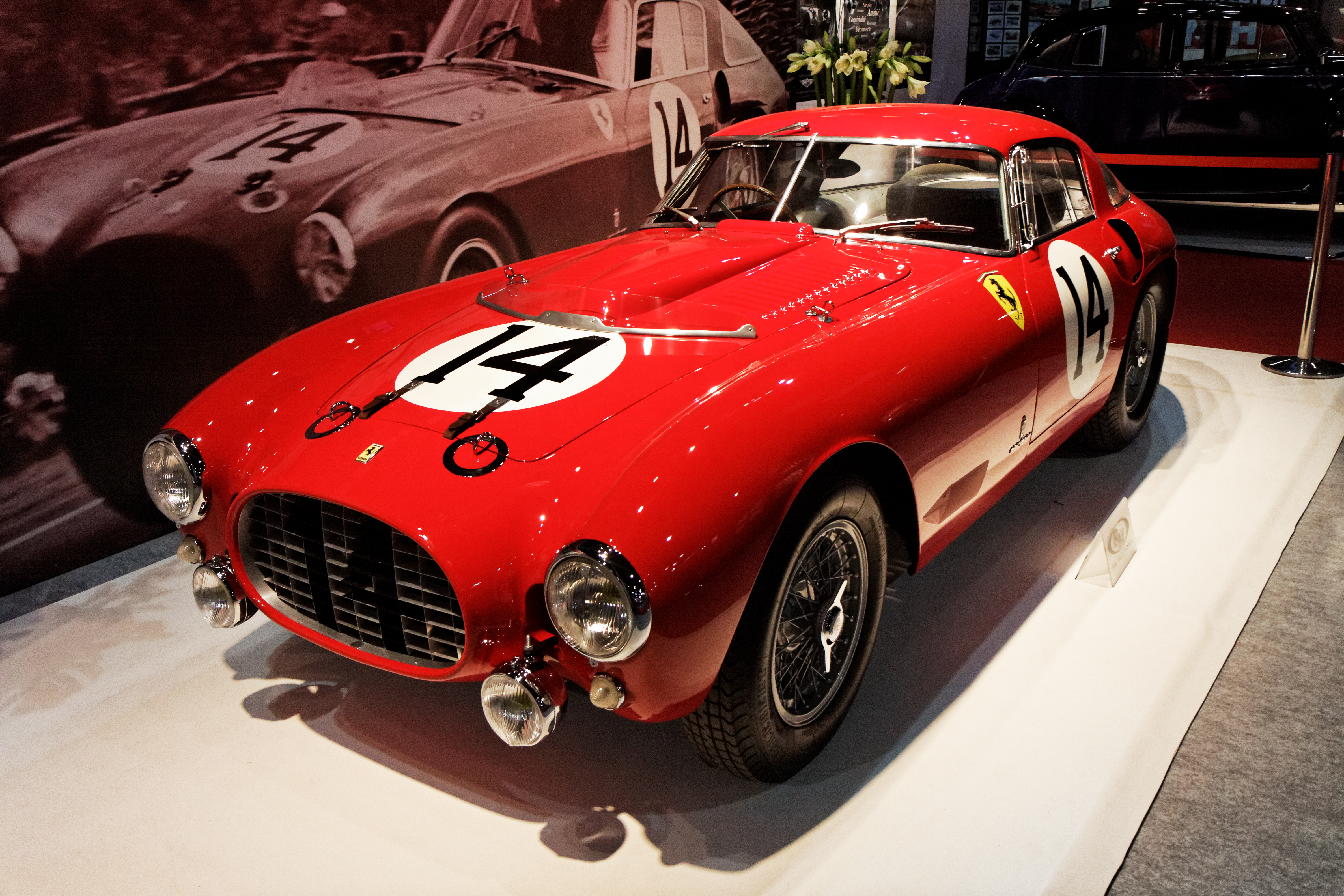 Une Ferrari 340 375 MM Berlinetta Competizione présentée lors du salon retromobile 2013.